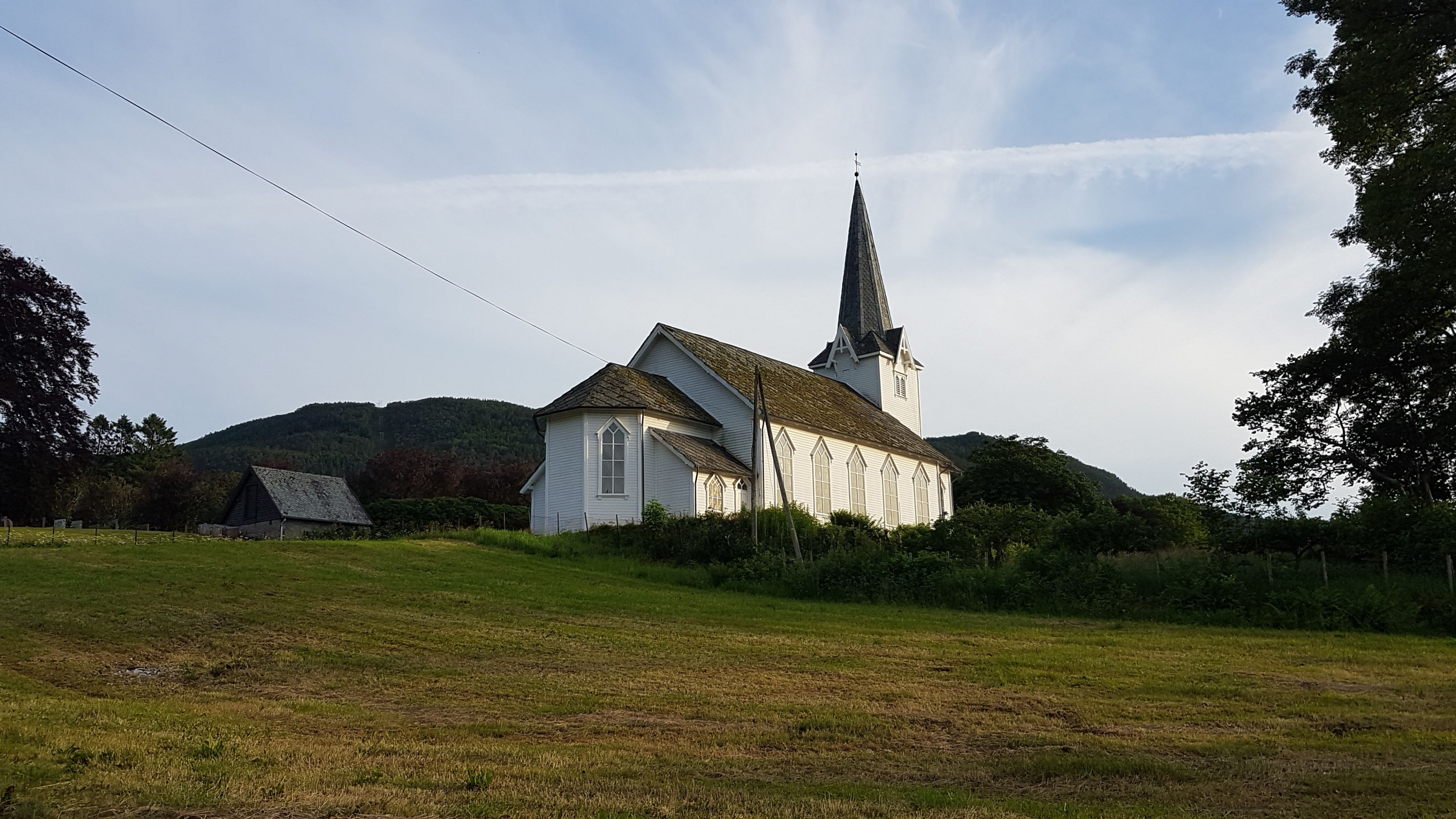 Skånevik kirke, Etne kommune